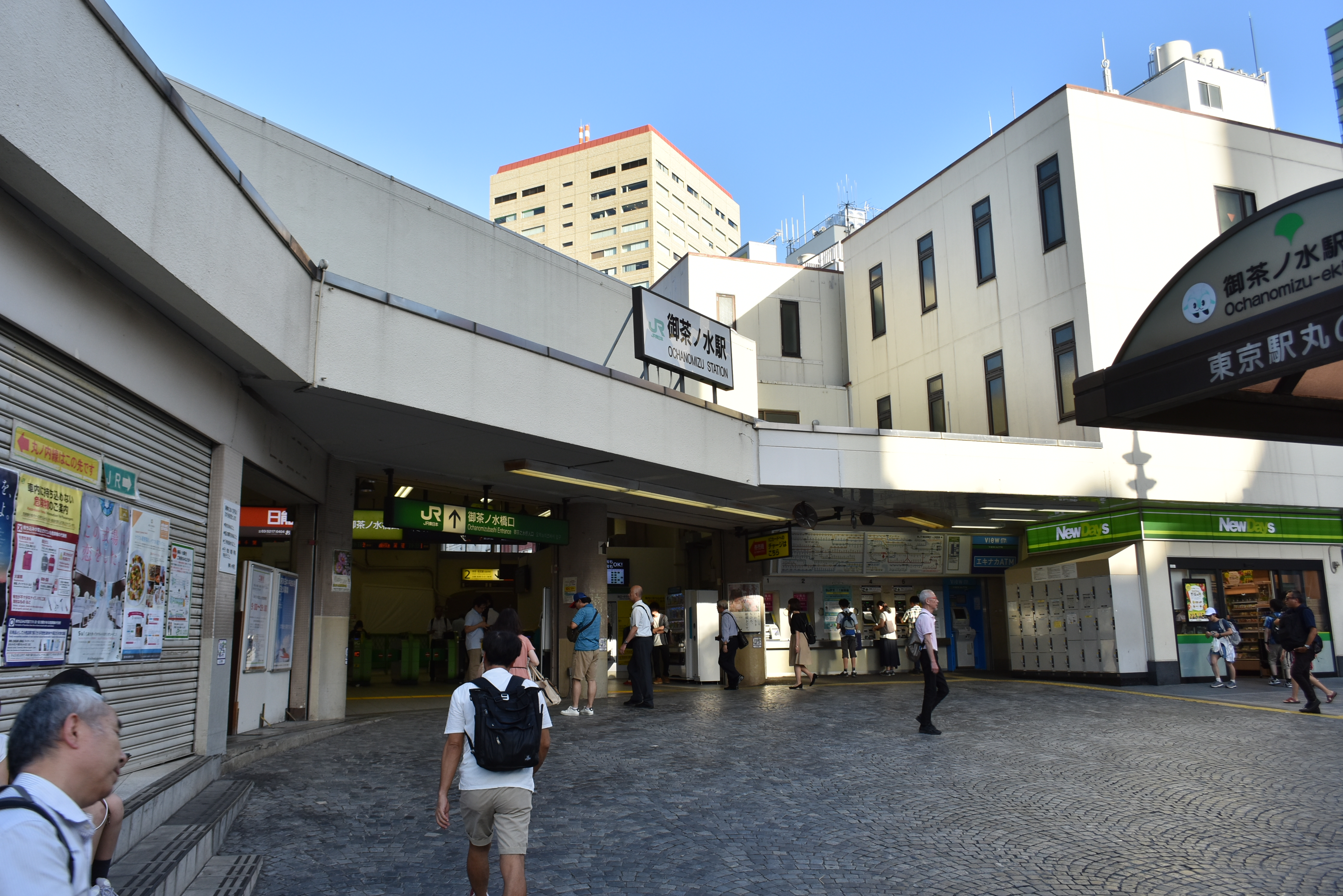 御茶ノ水駅